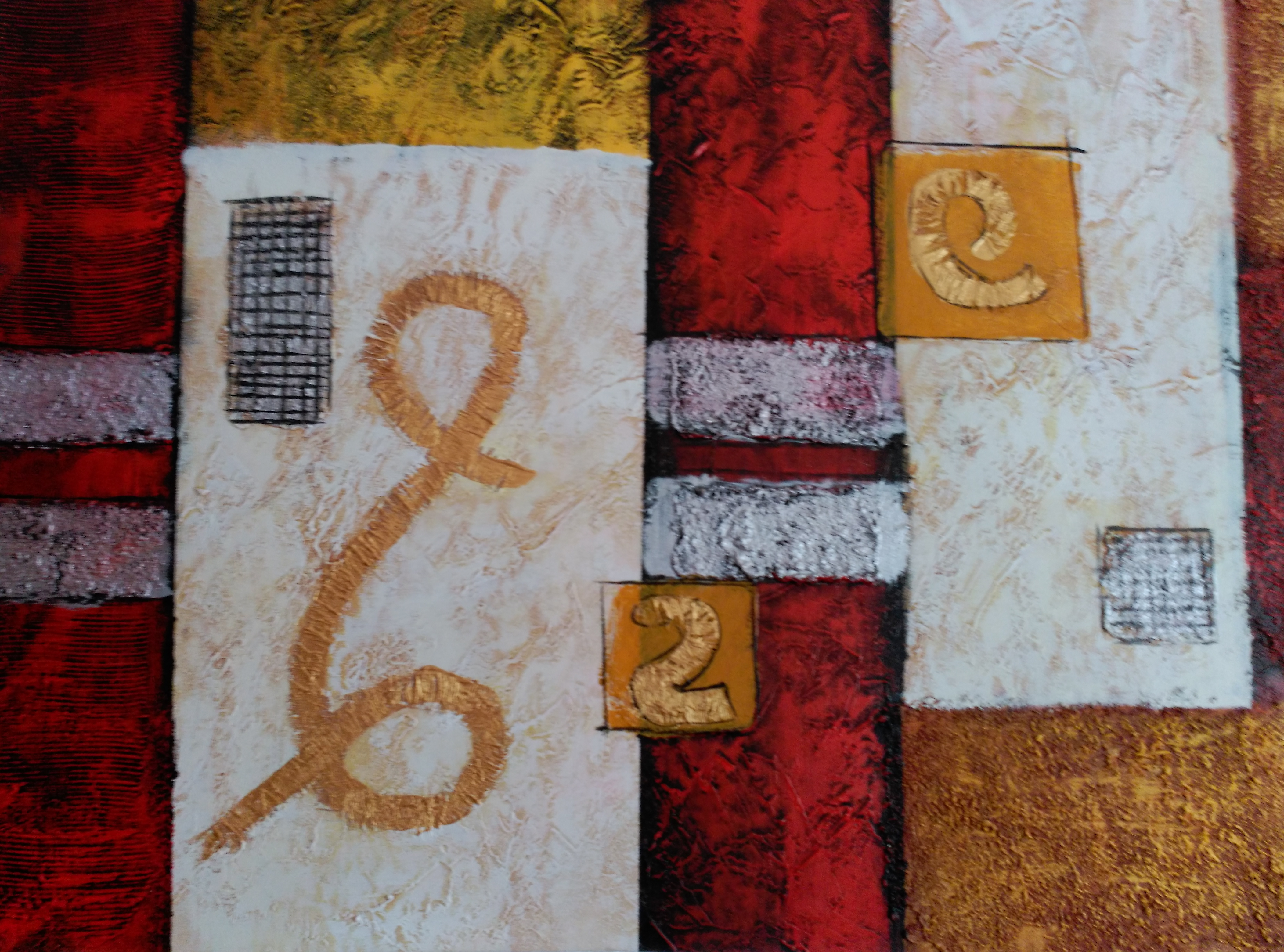 Imagen a emplear.